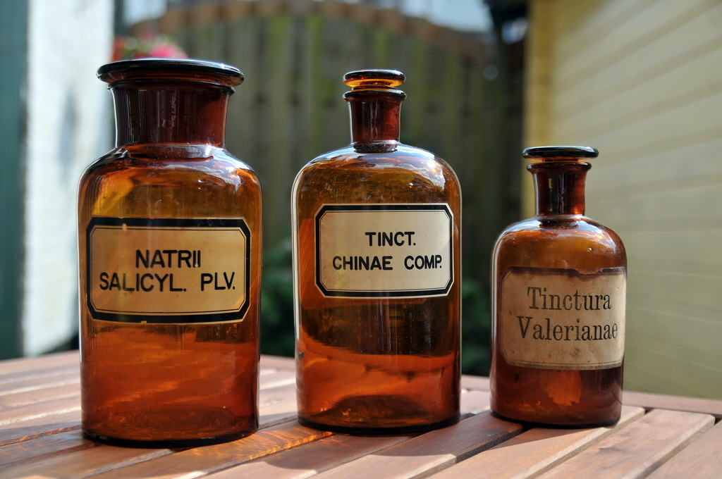 Natrii Salicyl. PLV------------------------Tinct. Chinae Comp.---------------Tinctura Valerianae.